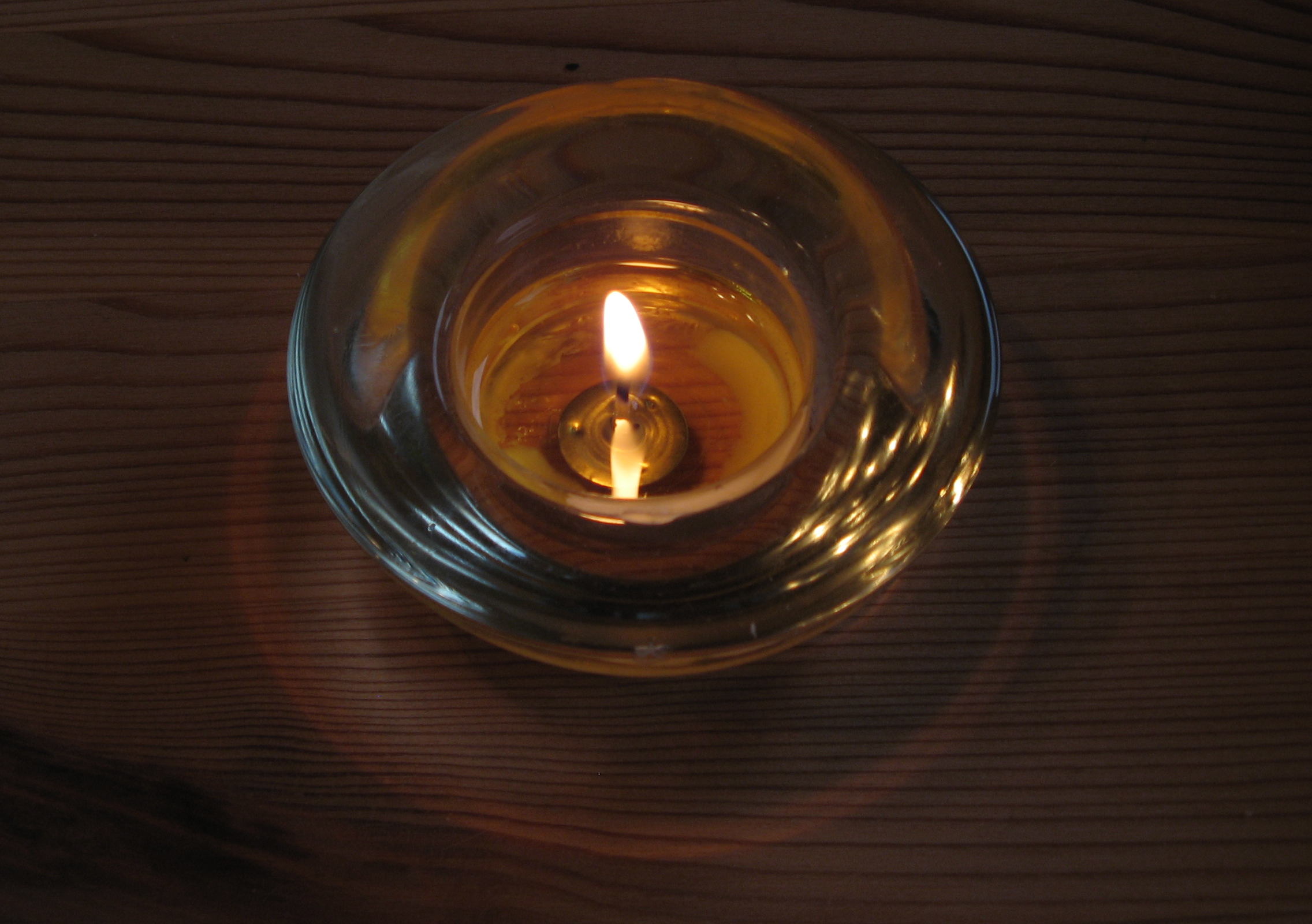 Brandend waxinelicht op houten tafel.